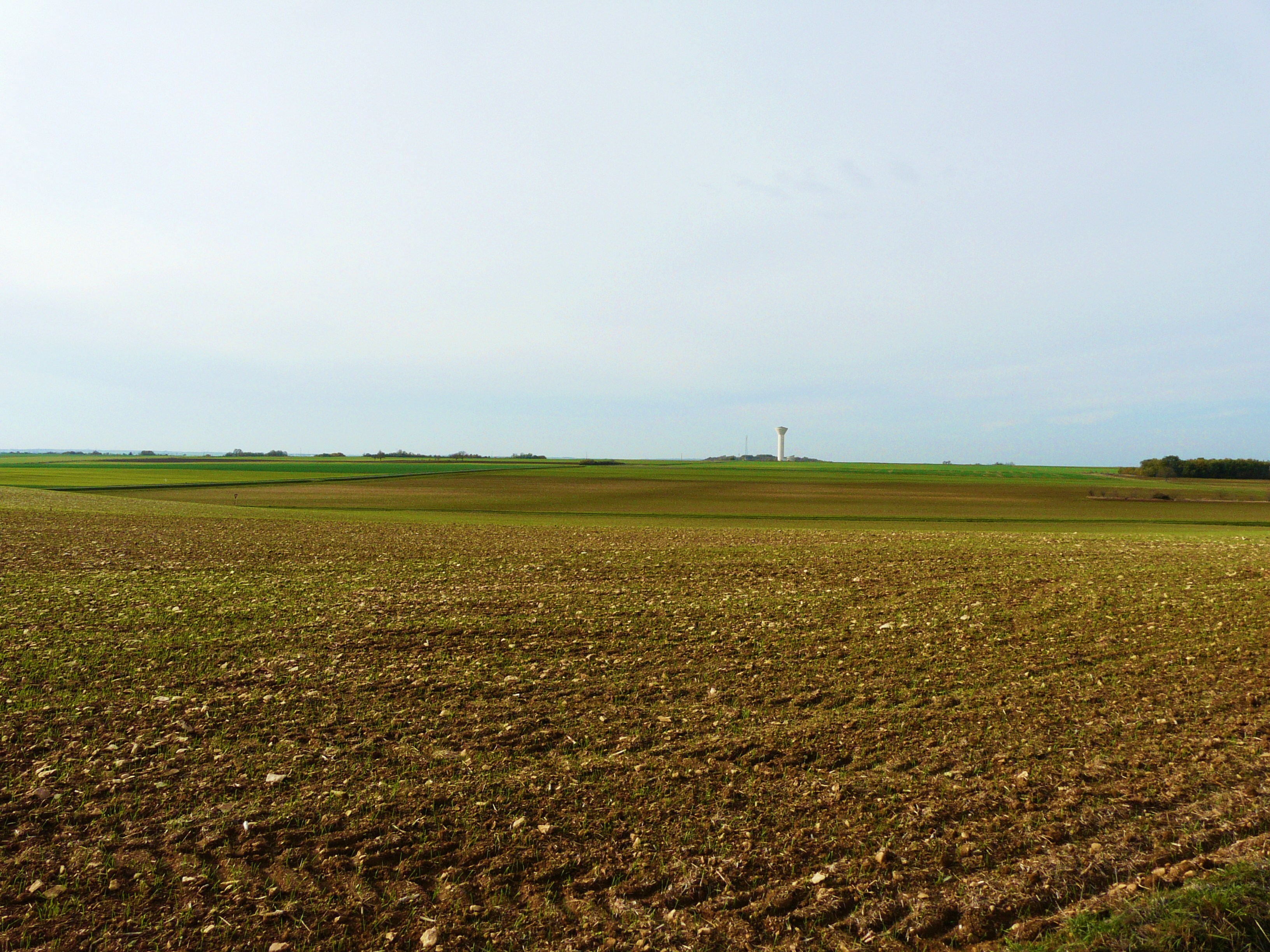 Vue depuis le moulin de la Loge, la plaine poitevine entre Mazeuil et Saint-Jean-de-Sauves, Vienne, France